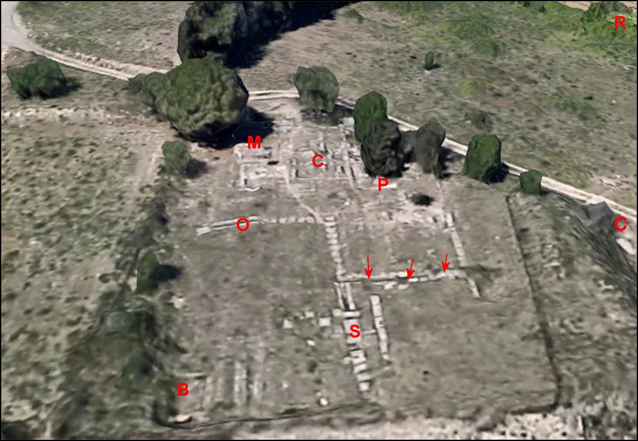 Site de Vivios , vue générale oblique, d'après Google Earth et une photo aérienne de drone.